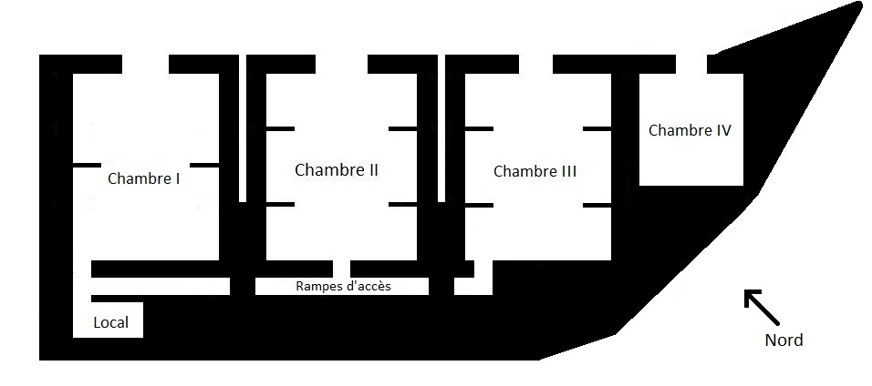 Plan de la batterie de mortiers du fort de Planoise, à Besançon (Doubs, France).